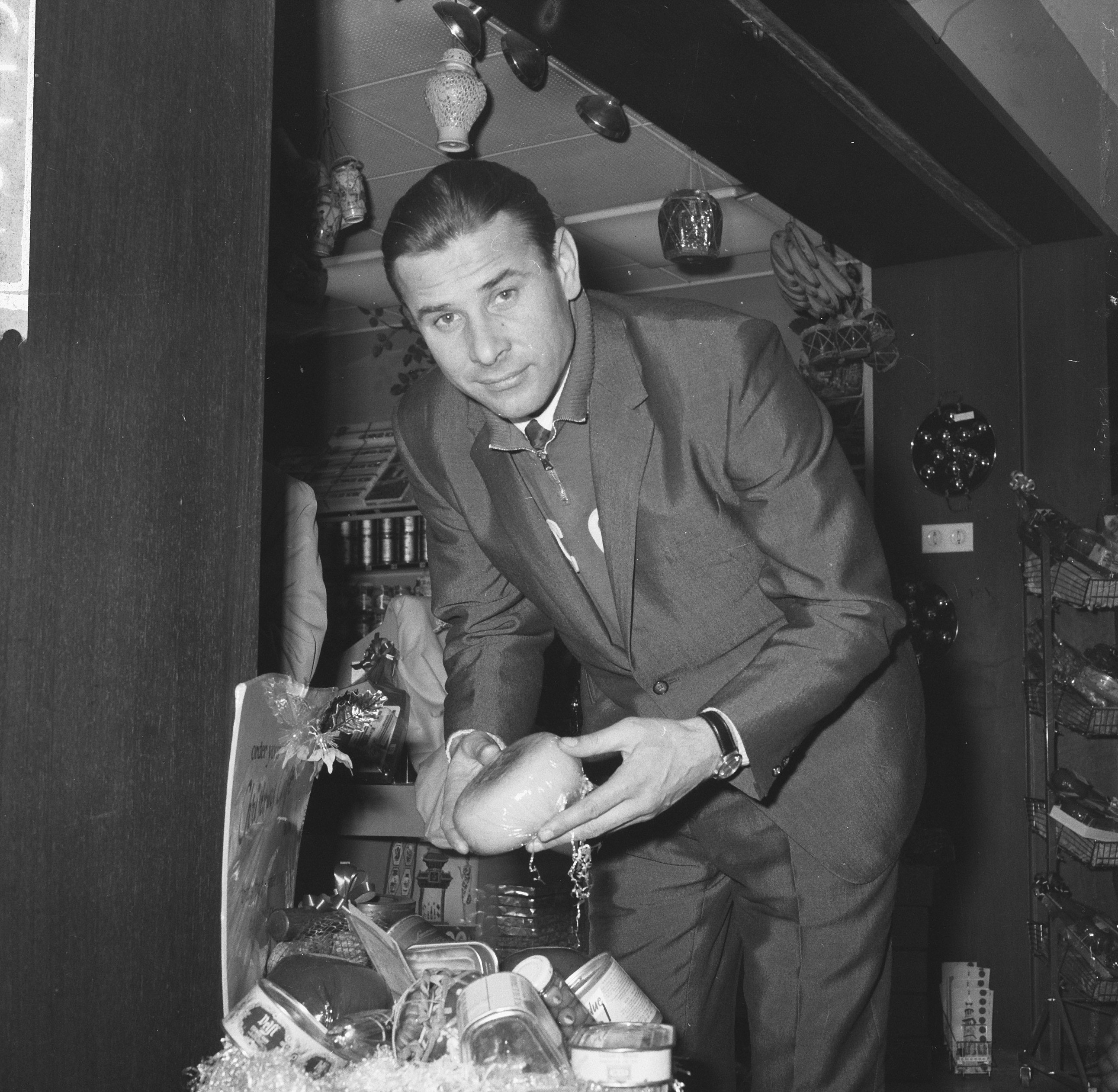 Collectie / Archief : Fotocollectie Anefo Reportage / Serie : Russisch voetbal-elftal op Schiphol. Voetballer Joeri Jashin bij het kopen van Nederlandse kaas Beschrijving : sport, voetbal, kaas, Jashin, Joeri Datum : 15 november 1965 Locatie : Noord-Holland, Schiphol Trefwoorden : kaas, sport, voetbal Persoonsnaam : Jashin, Joeri Fotograaf : Kroon, Ron / Anefo Auteursrechthebbende : Nationaal Archief Materiaalsoort : Negatief (zwart/wit) Nummer archiefinventaris : bekijk toegang 2.24.01.03 Bestanddeelnummer : 918-4493